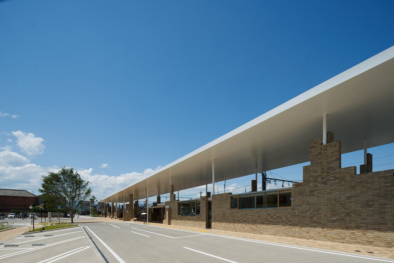 上信電鉄上州富岡駅3代目駅舎